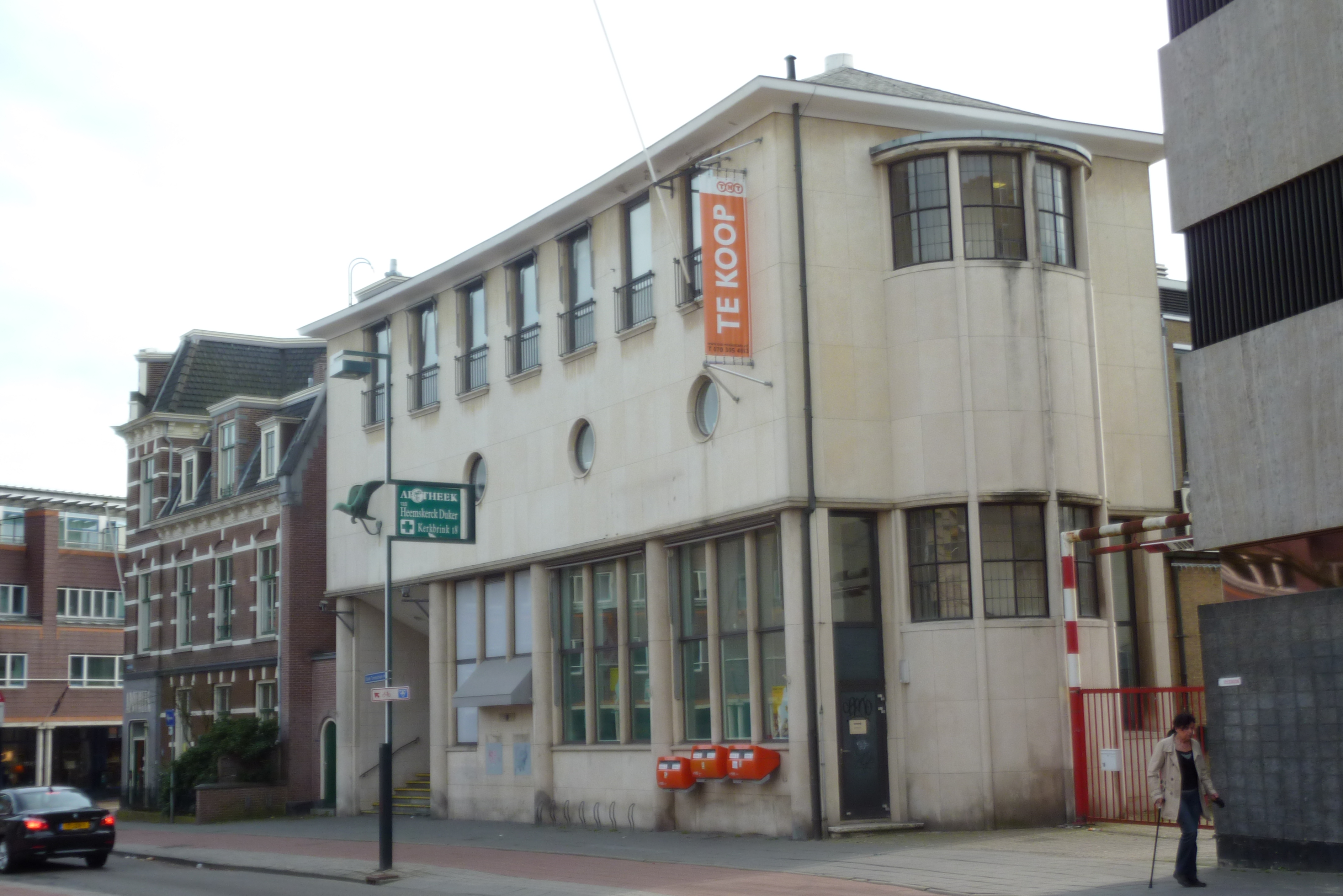 Hilversum: voormalig Postkantoor aan de Kerkbrink, F.E. Röntgen, 1940-1943.